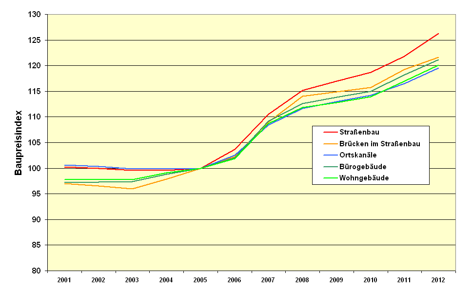 Entwicklung von Braupreisindizes zwischen 2001 und 2012 nach Angaben des Statistsischen Bundesamtes, Basisjahr 2005 = 100